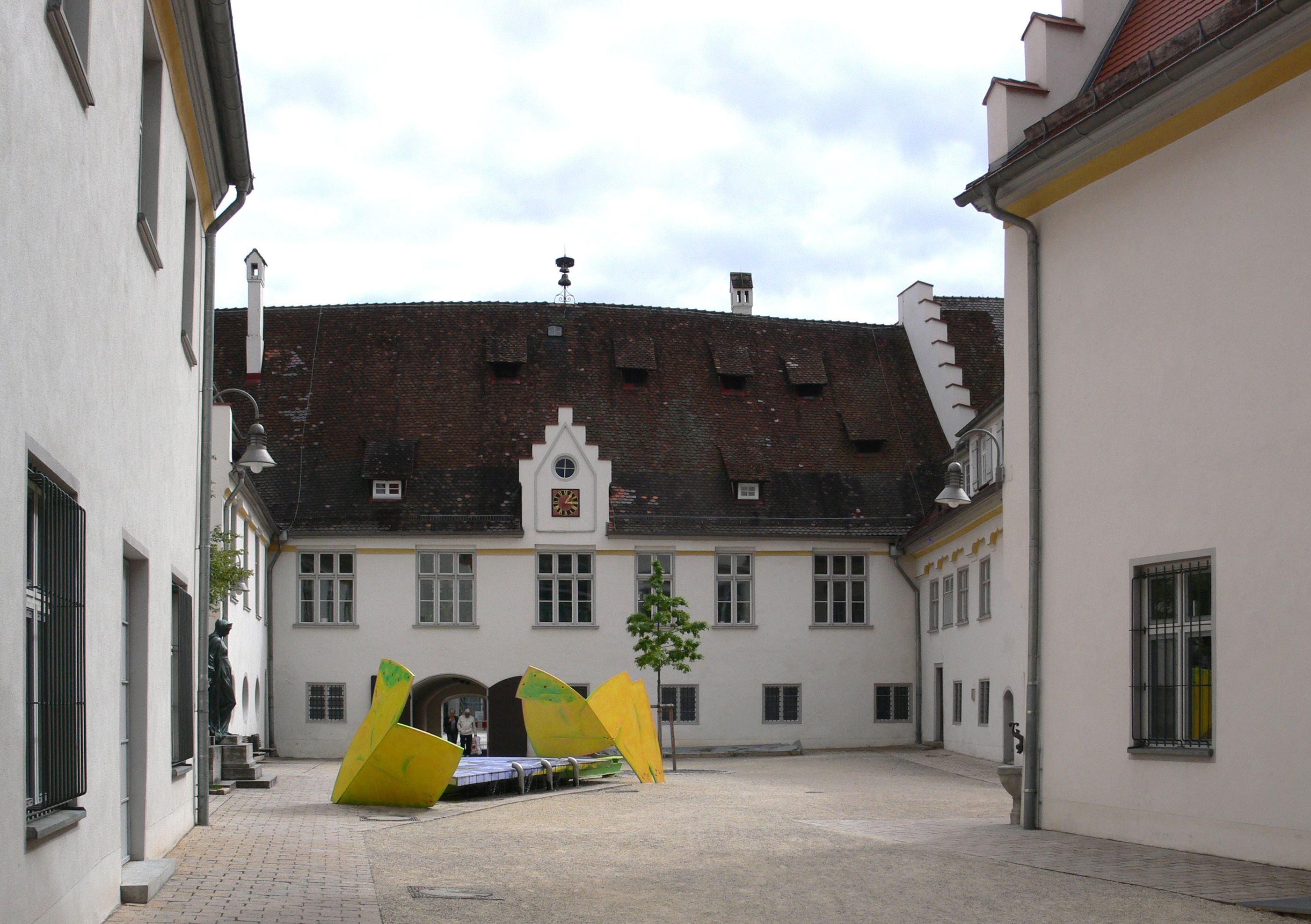 Biberach an der Riß, Heilig-Geist-Spital, Innenhof mit Skulptur von Wolfgang Thiel